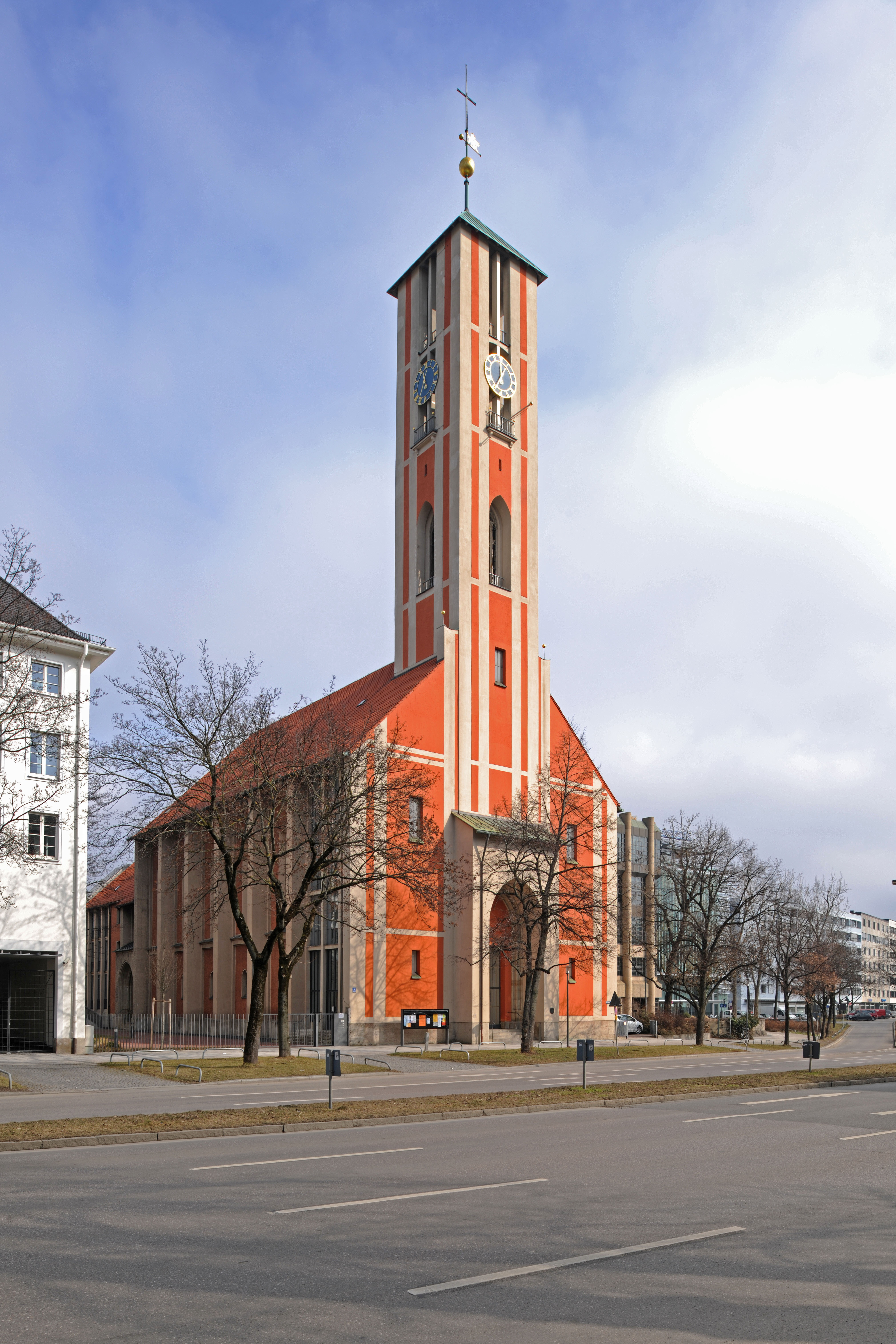 München, Fassadenansicht Gabelsbergerstraße 6. Die erneuerte Sankt Markus Kirche.